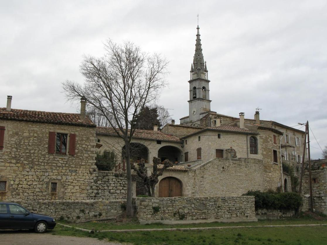 village de Saint-André de Cruzières (Ardèche)